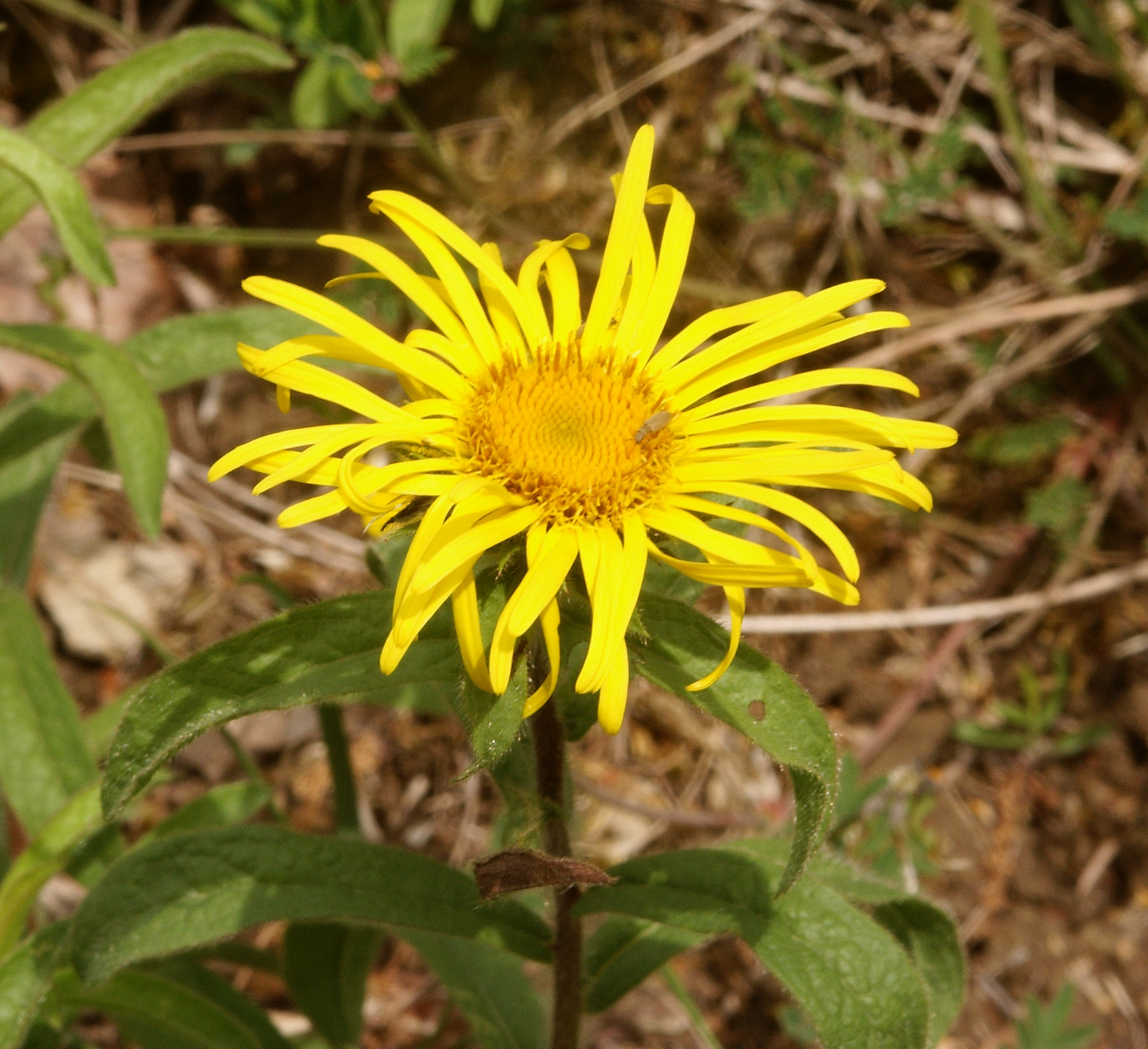 Inula hirta, Tauberland, Germany